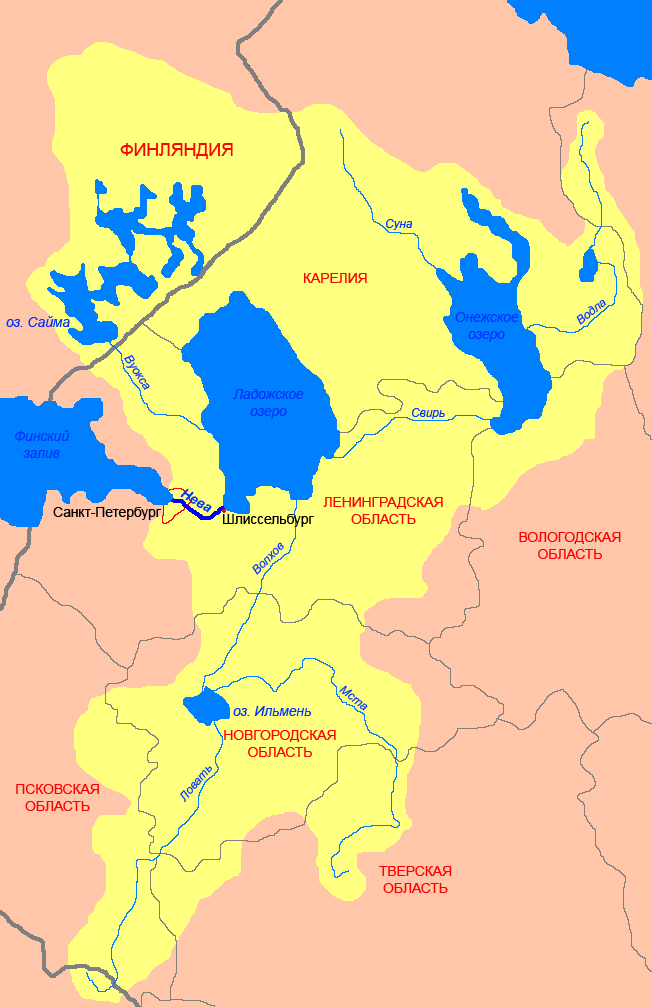 Схема Невско-Ладожского бассейна